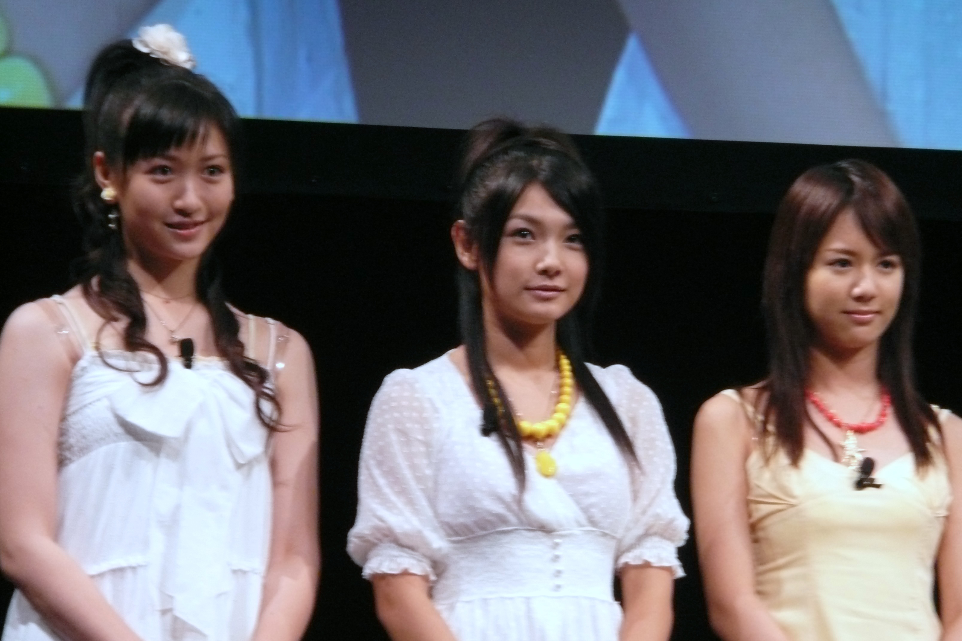 アイドリング!!!（左から横山ルリカ、外岡えりか、遠藤舞）